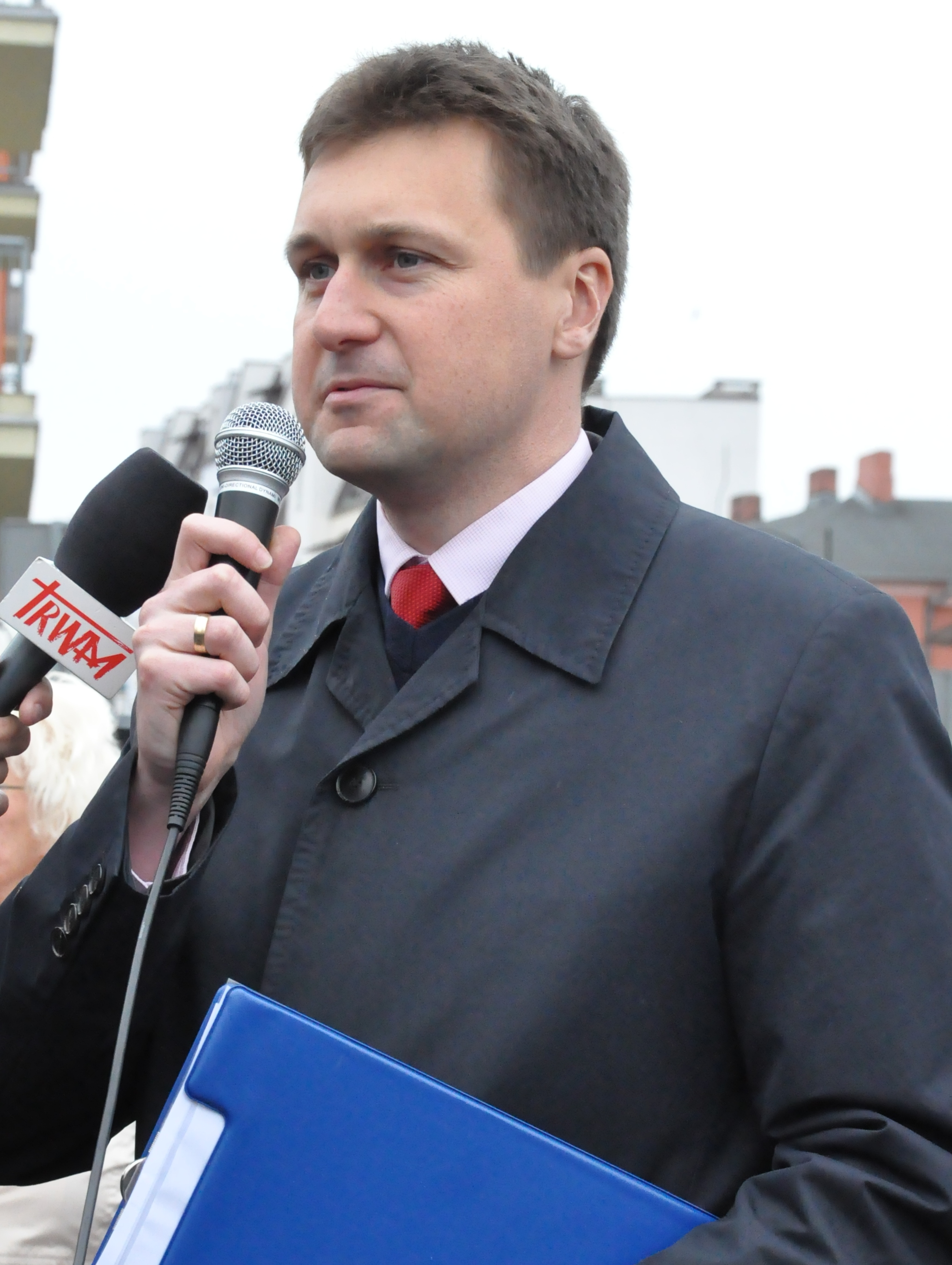 poseł Łukasz Zbonikowski